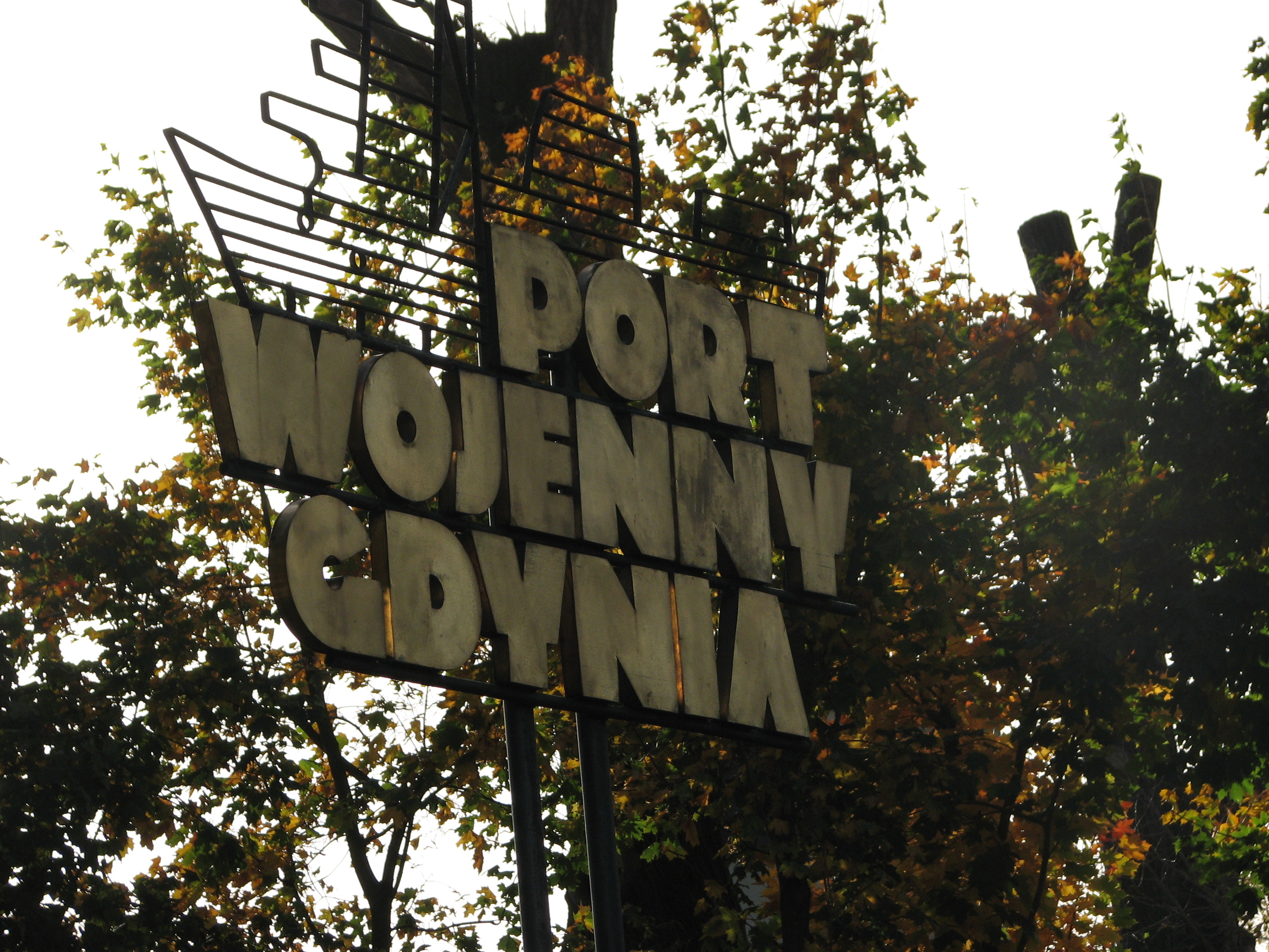 Oznaka przy bramie głównej Portu Wojennego Gdynia.